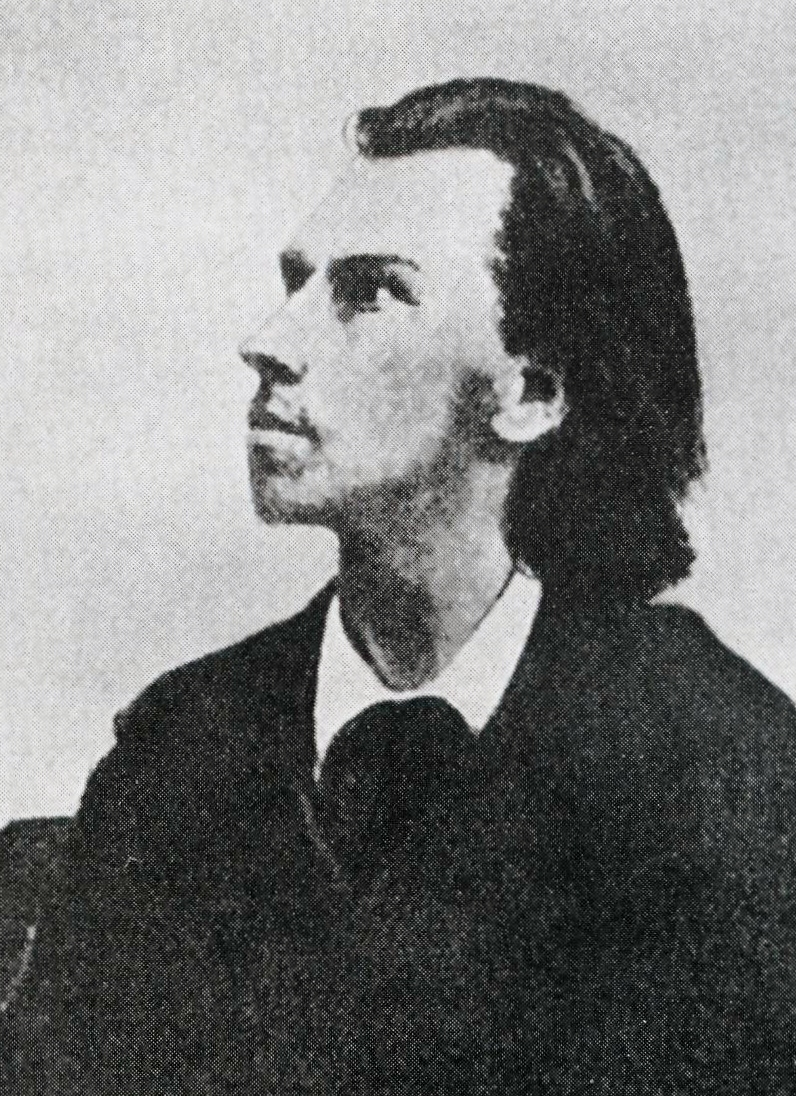 photo Konstantin Fofanov (russian: Константин Михайлович Фофанов, 1862—1911), Russian poet